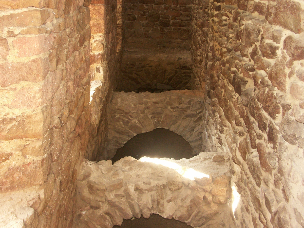 Kloster Buch: Reste des ehemaligen Necessariums